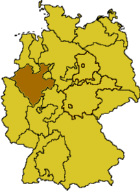 Ekd-westfalen